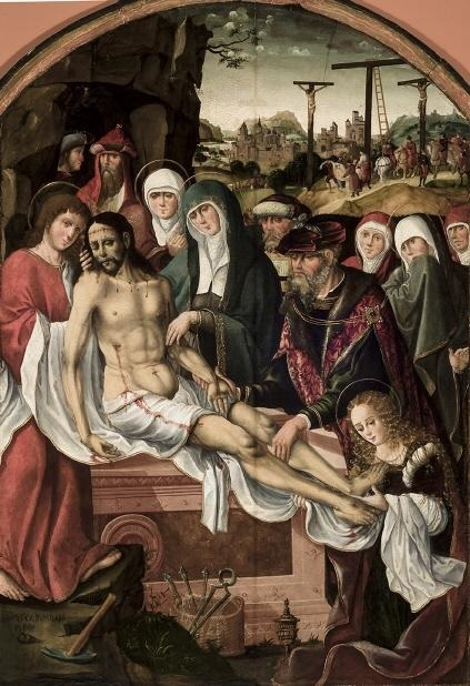 El lienzo representa el momento en que el cadaver de Jesucristo, después de haber muerto en la cruz, fue depositado en el sepulcro por sus familiares y discípulos.